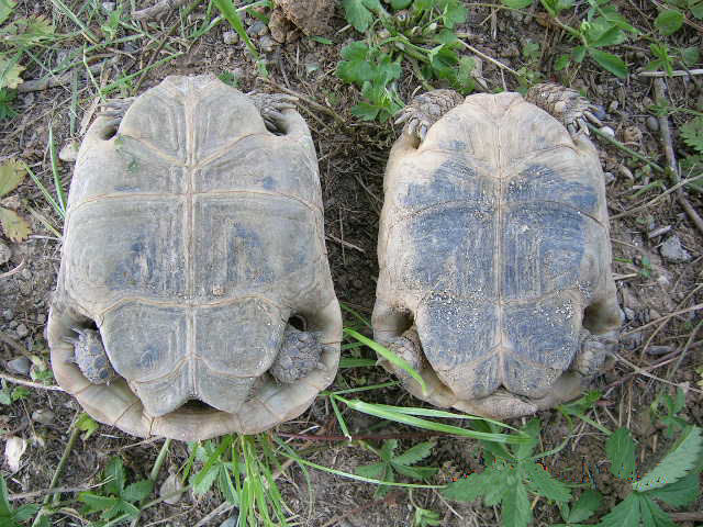 Testudo graeca, Lombardia, Italia